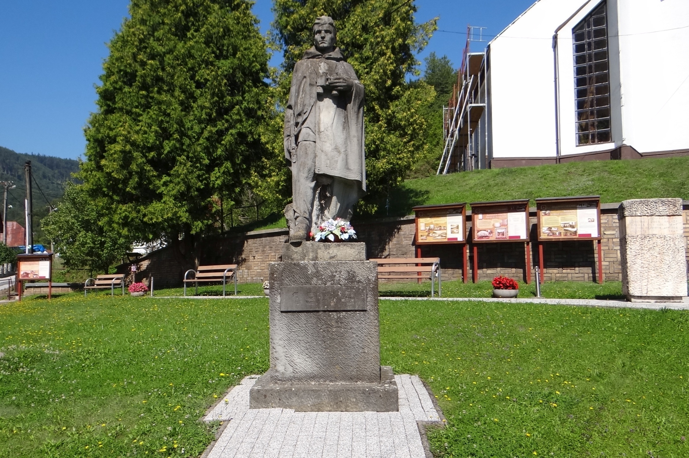 Baláže